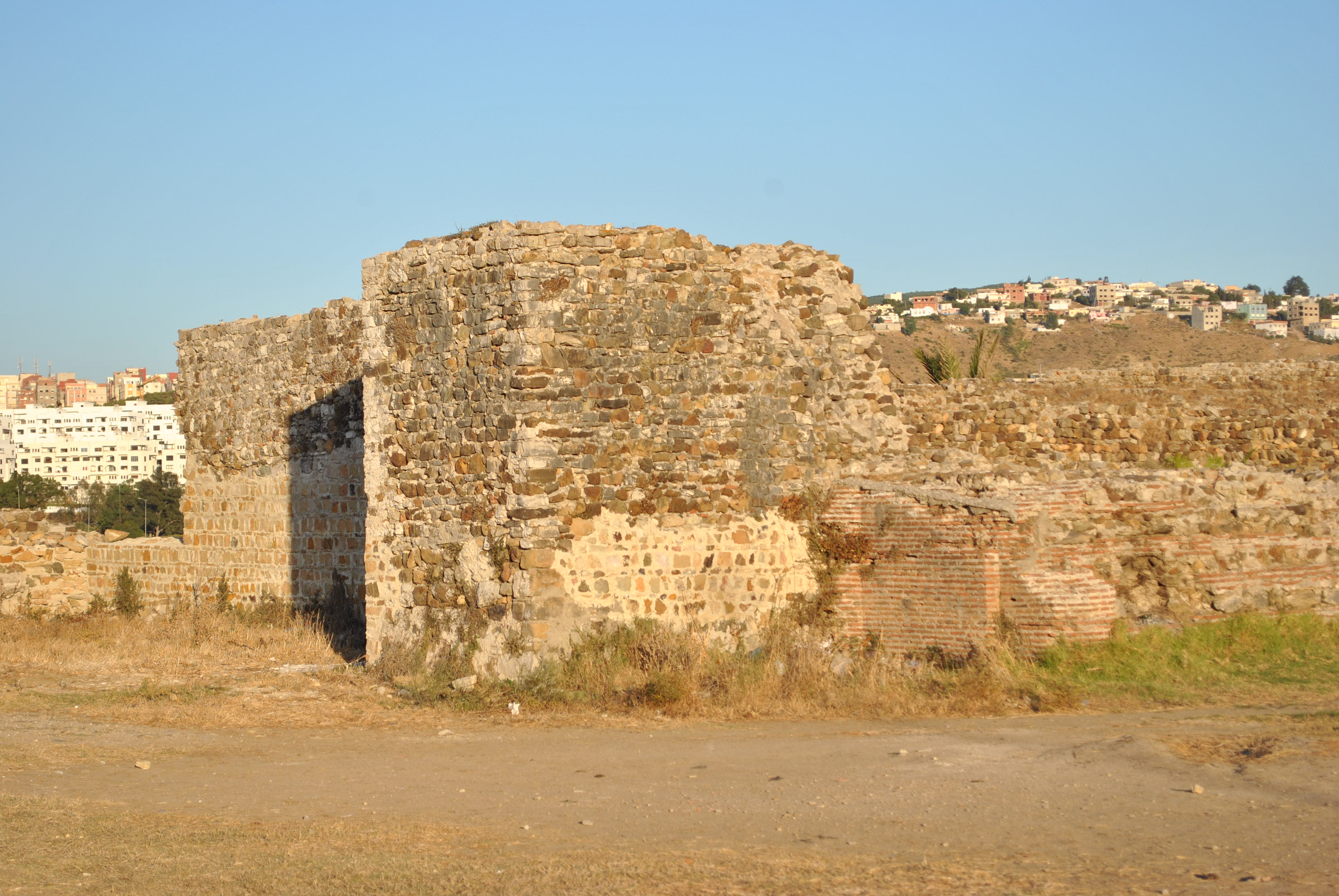 Ruines de Tingis